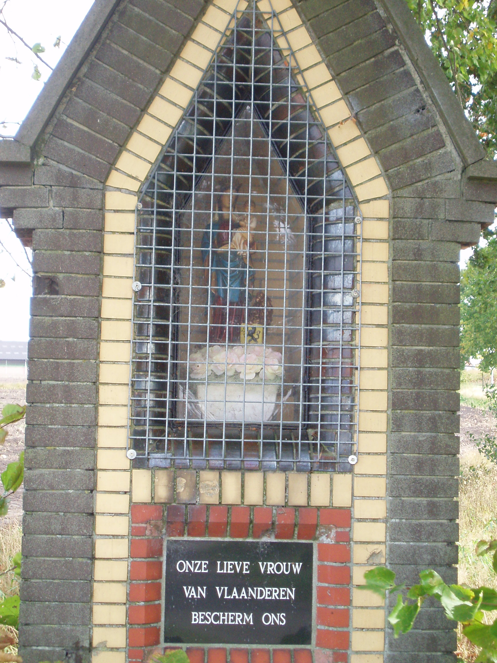 Wegkapel Zondereigen